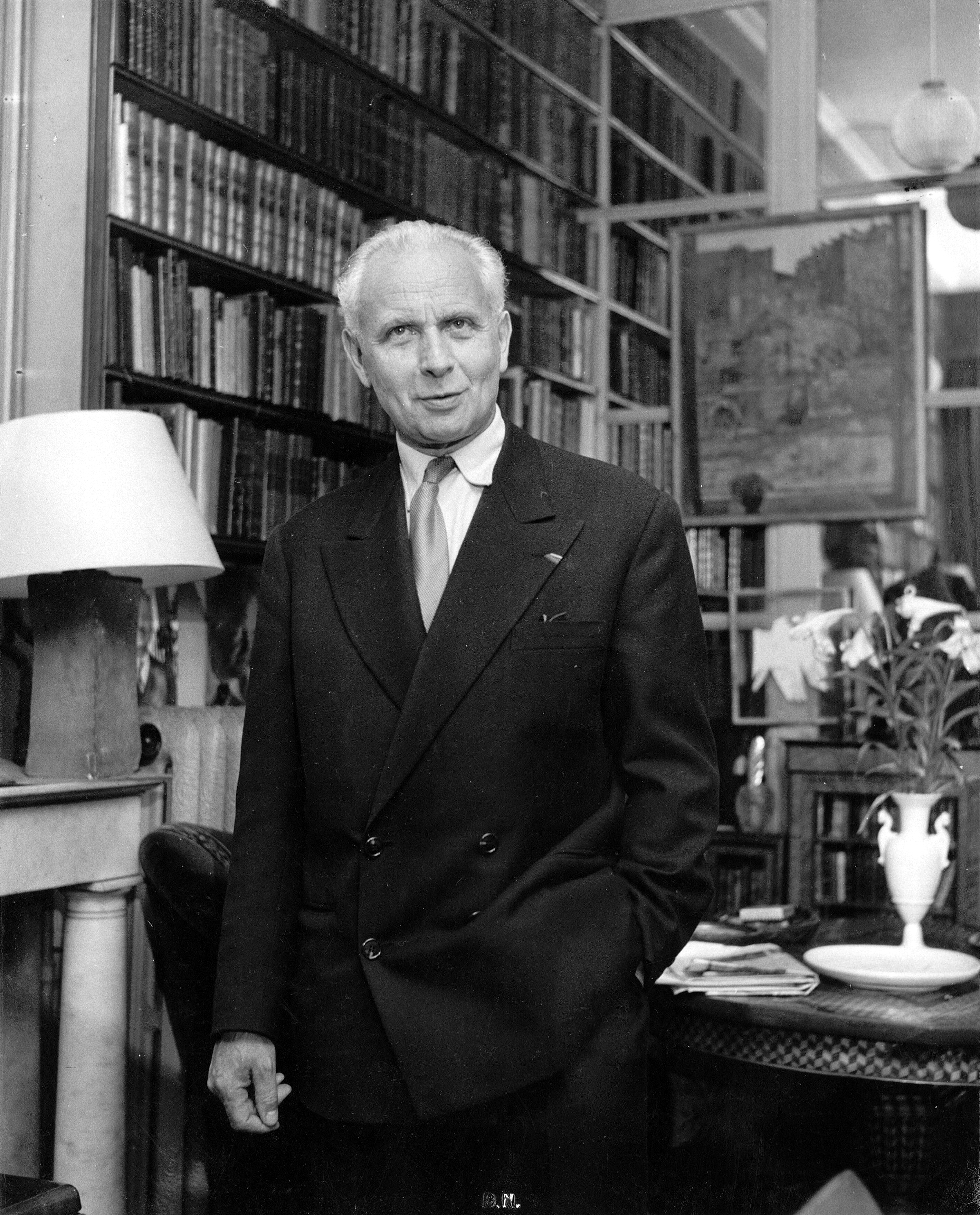 Portrait de Louis Aragon